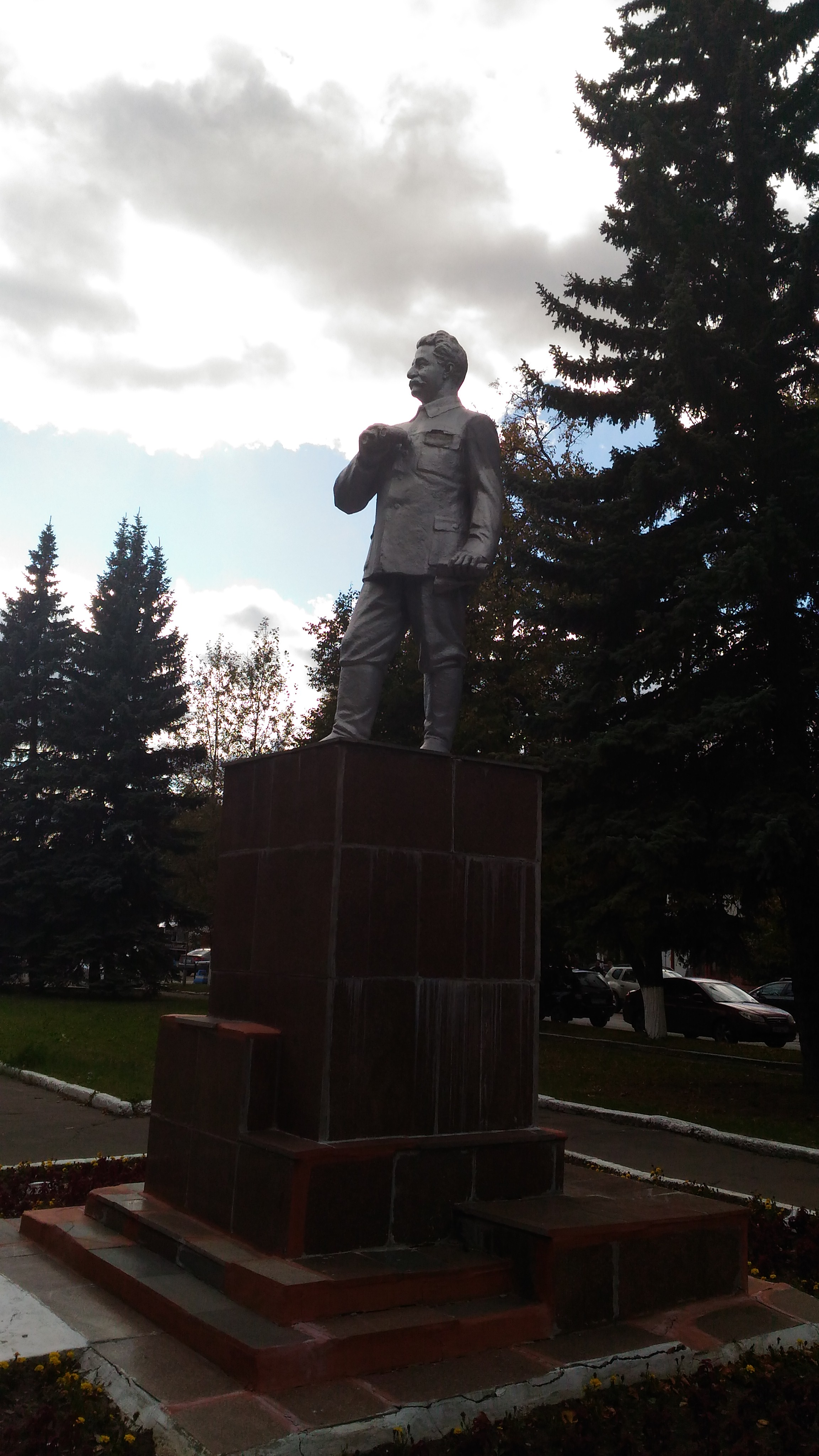 Нижний Новгород. Памятник Г.К. Орджоникидзе у Главной проходной ОАО "Сокол"